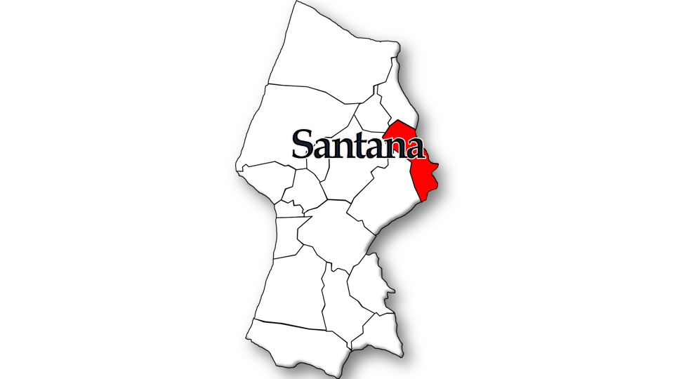 População